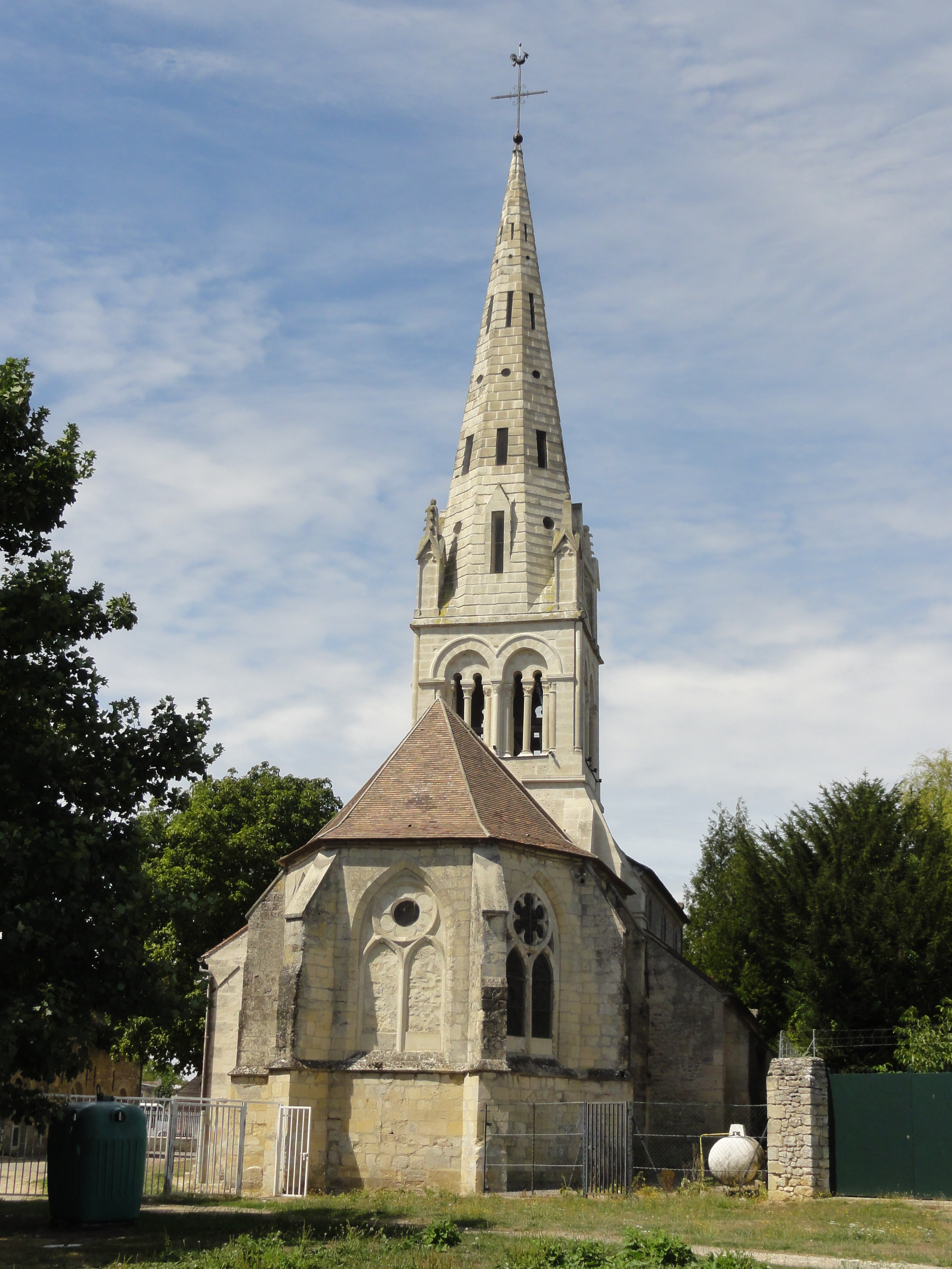 Église Saint-Martin de Néry (voir titre).